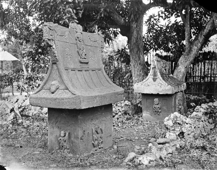 Negatief. Alfoers graf, Minahasa, Sulawesi